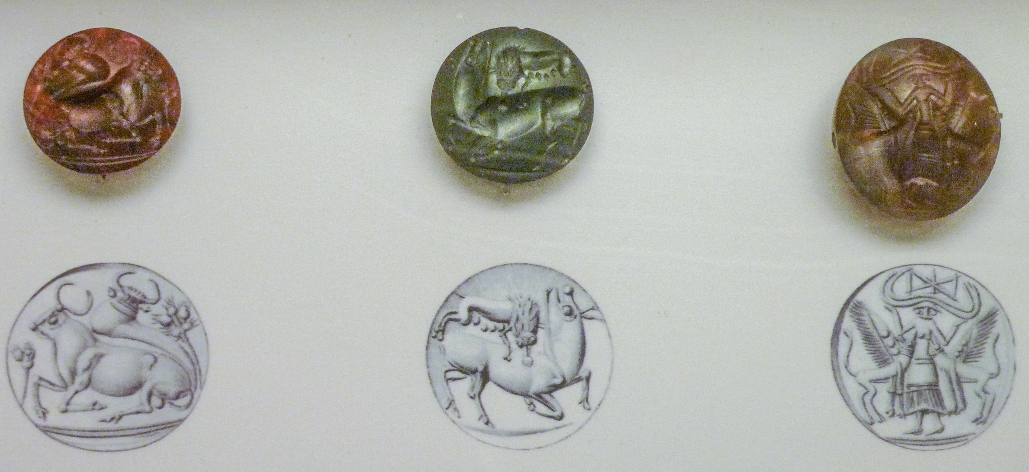 sceaux minoens. De gauche à droite : sceau en hématite avec représentation d'animal, Knossos (-1450 à -1400); sceau en hématite avec représentation d'animal, Knossos (-1450 à -1400); sceau en onyx avec représentation de la Maitresse des Animaux, Knossos (1450 à 1400=